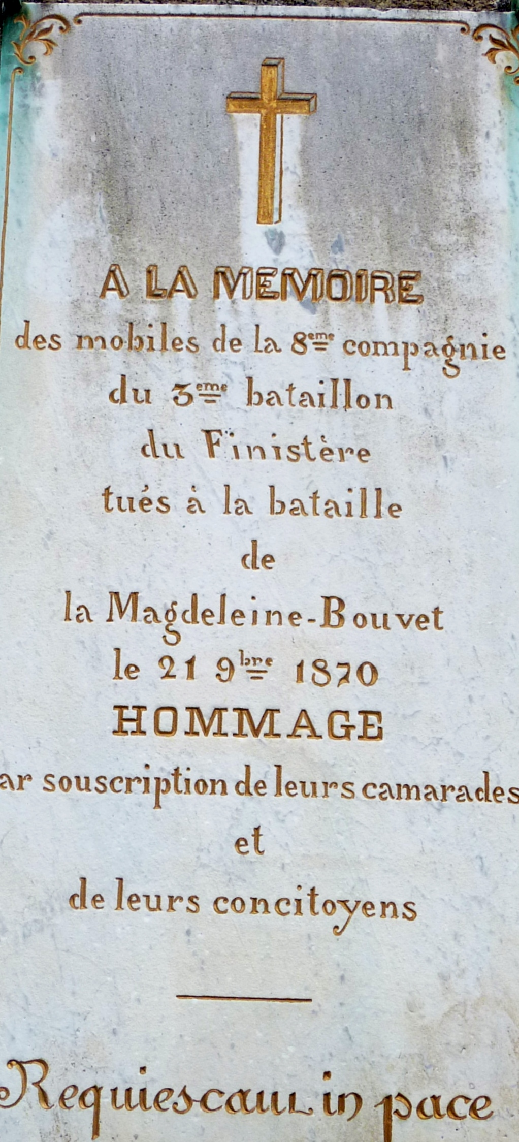 Pont-Aven : église paroissiale Saint-Joseph, panneau d'hommage aux morts de la 8ème compagnie du 3ème bataillon des gardes mobiles du Finistère tués à la bataille de La Magdeleine-Bouvet [La Madeleine-Bouvet (Orne)] le 21 septembre 1870